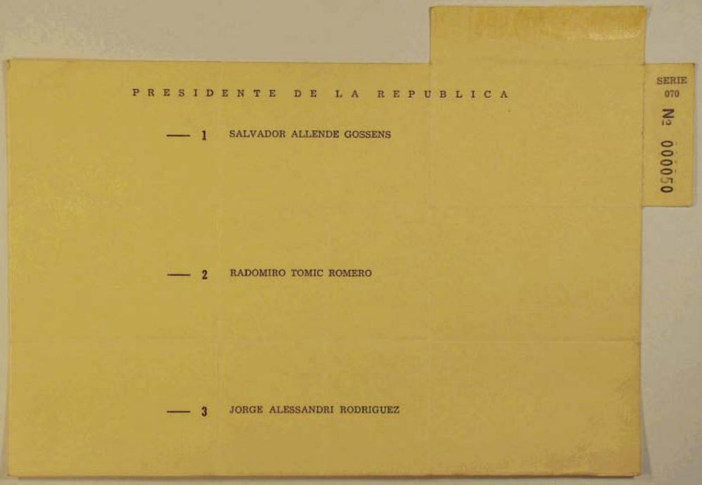 Ejemplar del voto utilizado en la elección presidencial de Chile de 1970.